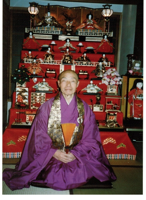 Un immagine del maestro Tetsugyu Soin